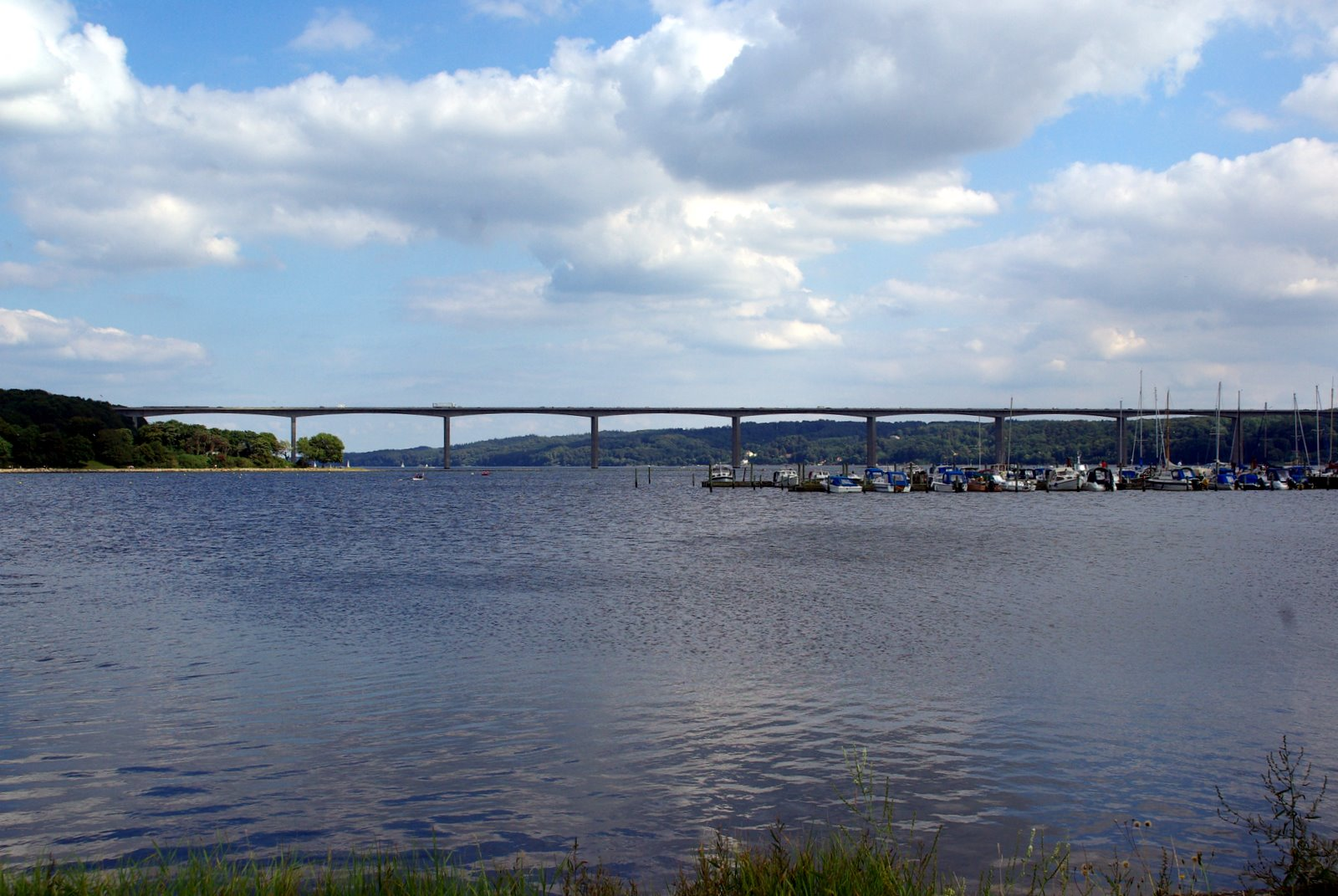 Vejle fjordi sild